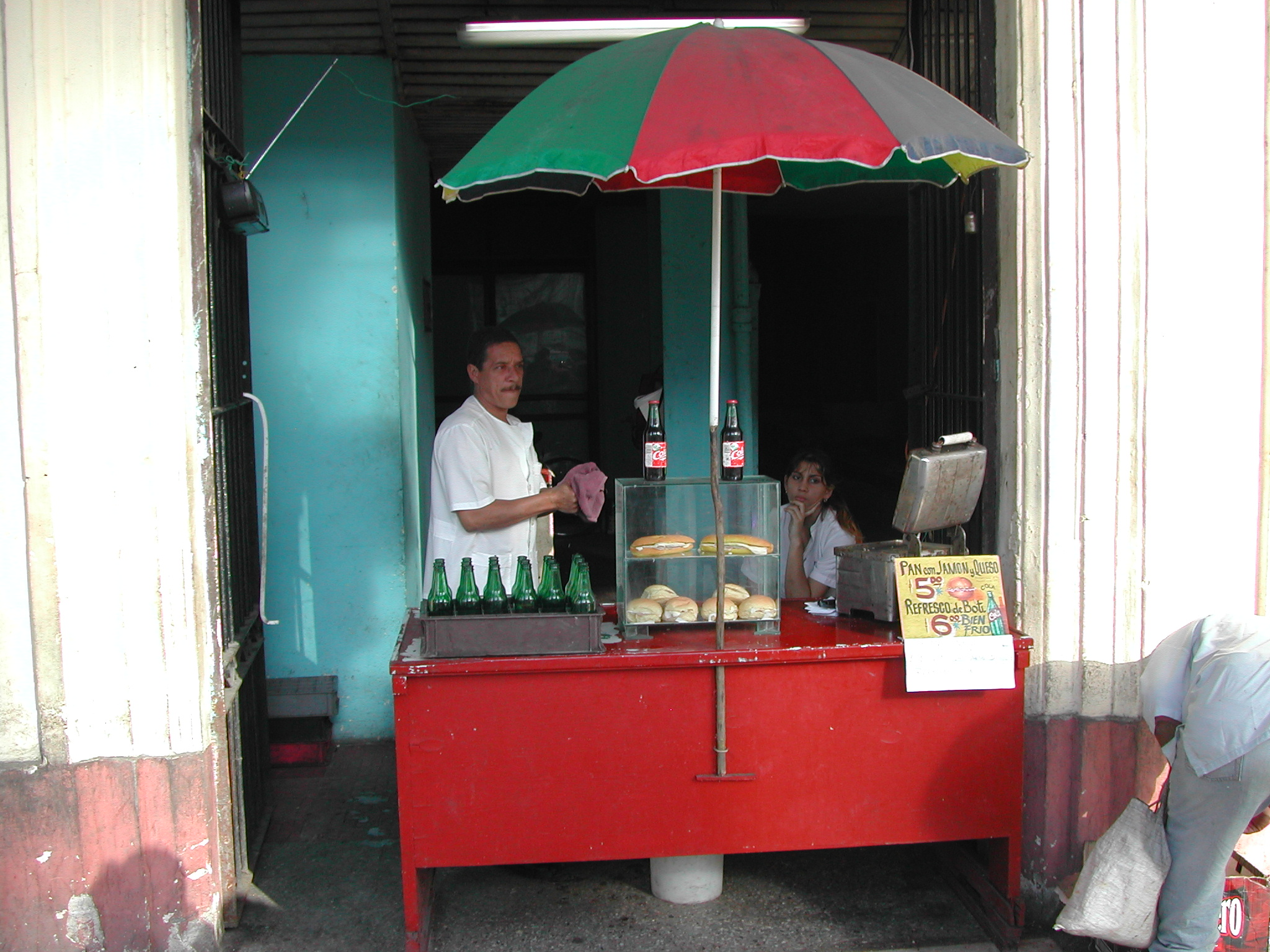 La Habana, Cuba